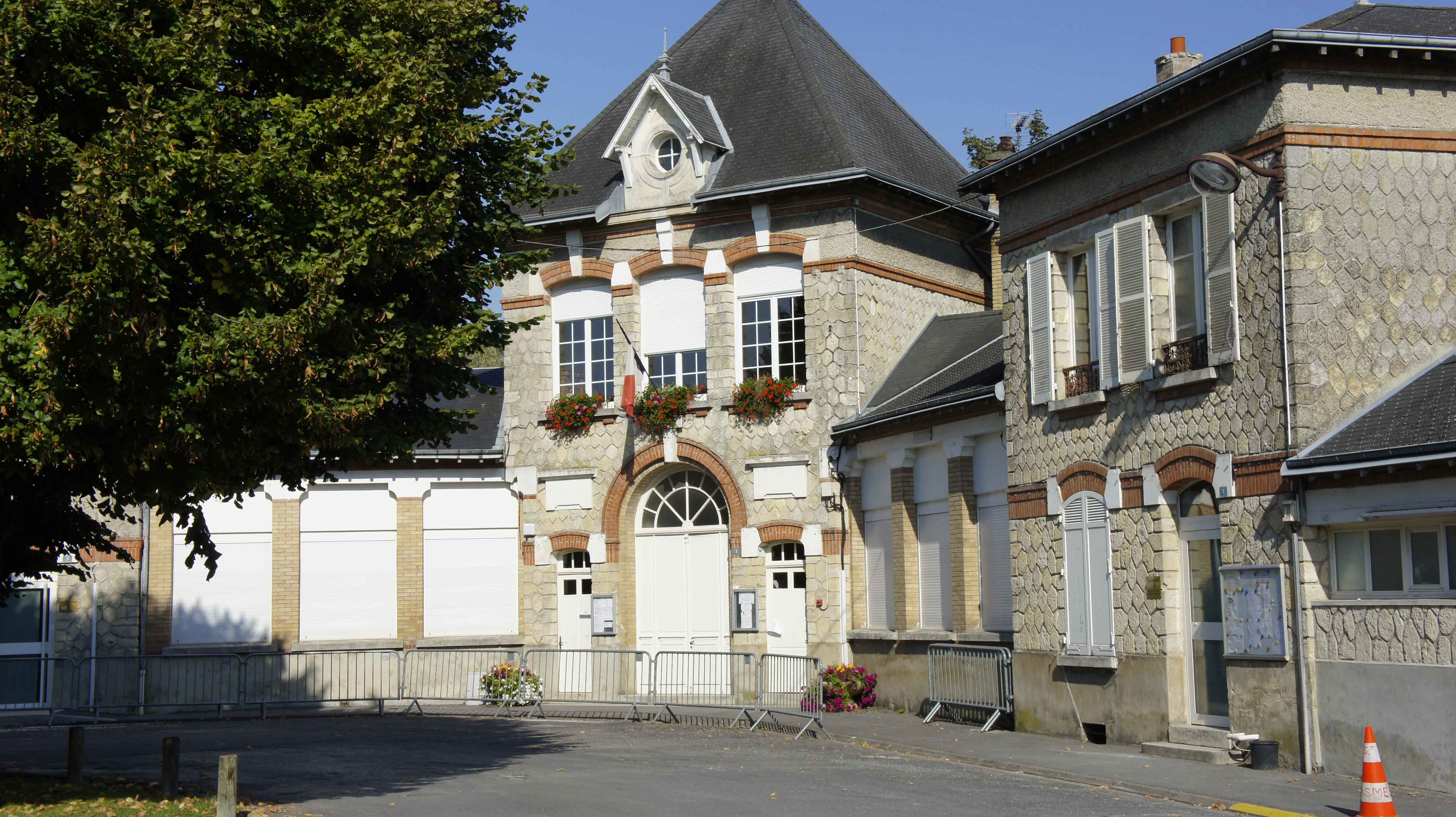 Mairie de Saint-Masmes.